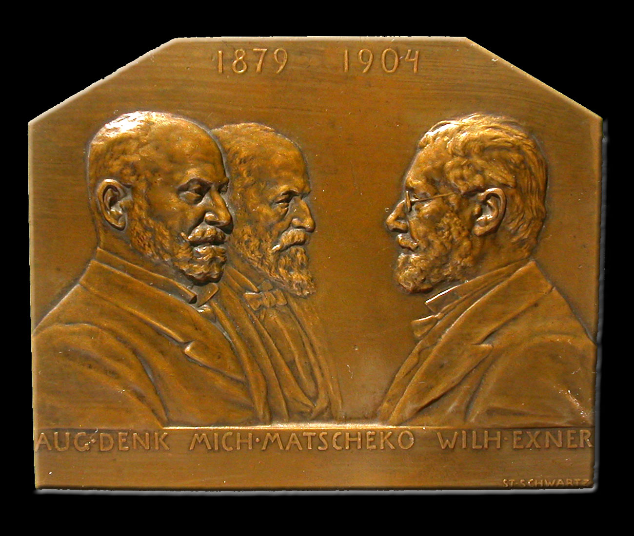 August Denk, Michael Matscheko, Wilhelm Exner: Gründer des K.u.K Technologischen Gewerbemuseums Wien Bezeichnet mit: „1879-1904 / Aug.Denk Mich.Matscheko Wilh.Exner / St. Schwartz“ Rückseite zu